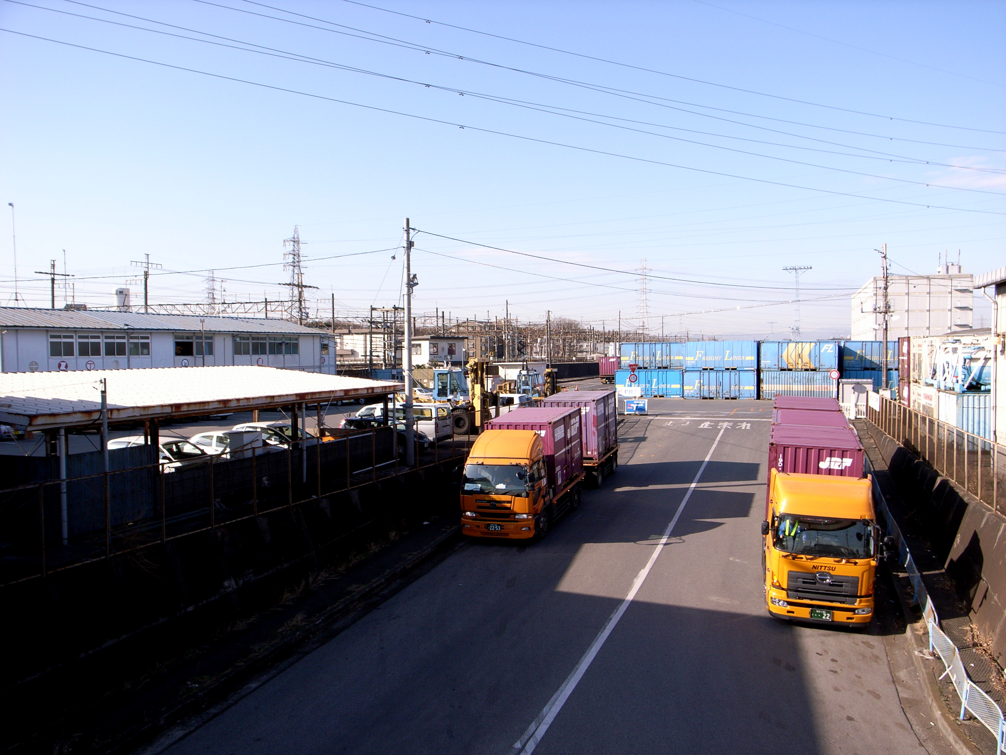 武蔵野線新座貨物ターミナル駅入り口